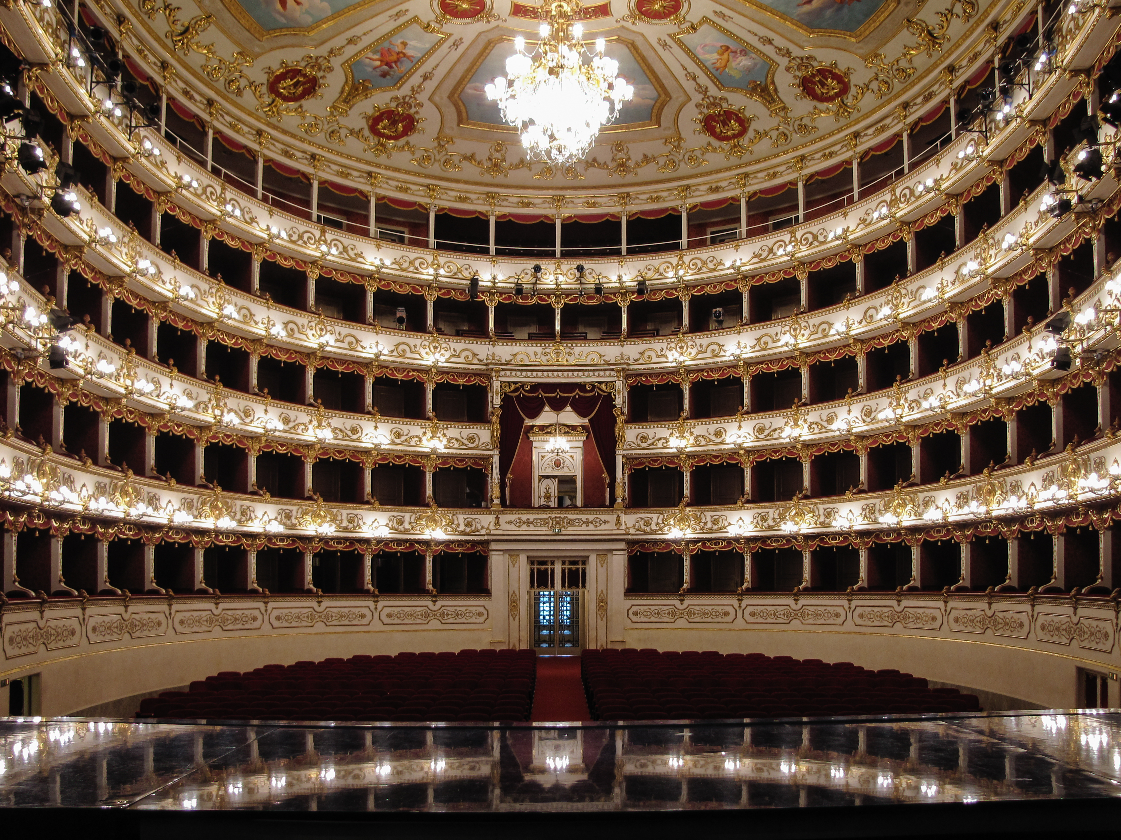 Teatro Municipale Romolo Valli This is a photo of a monument which is part of cultural heritage of Italy.